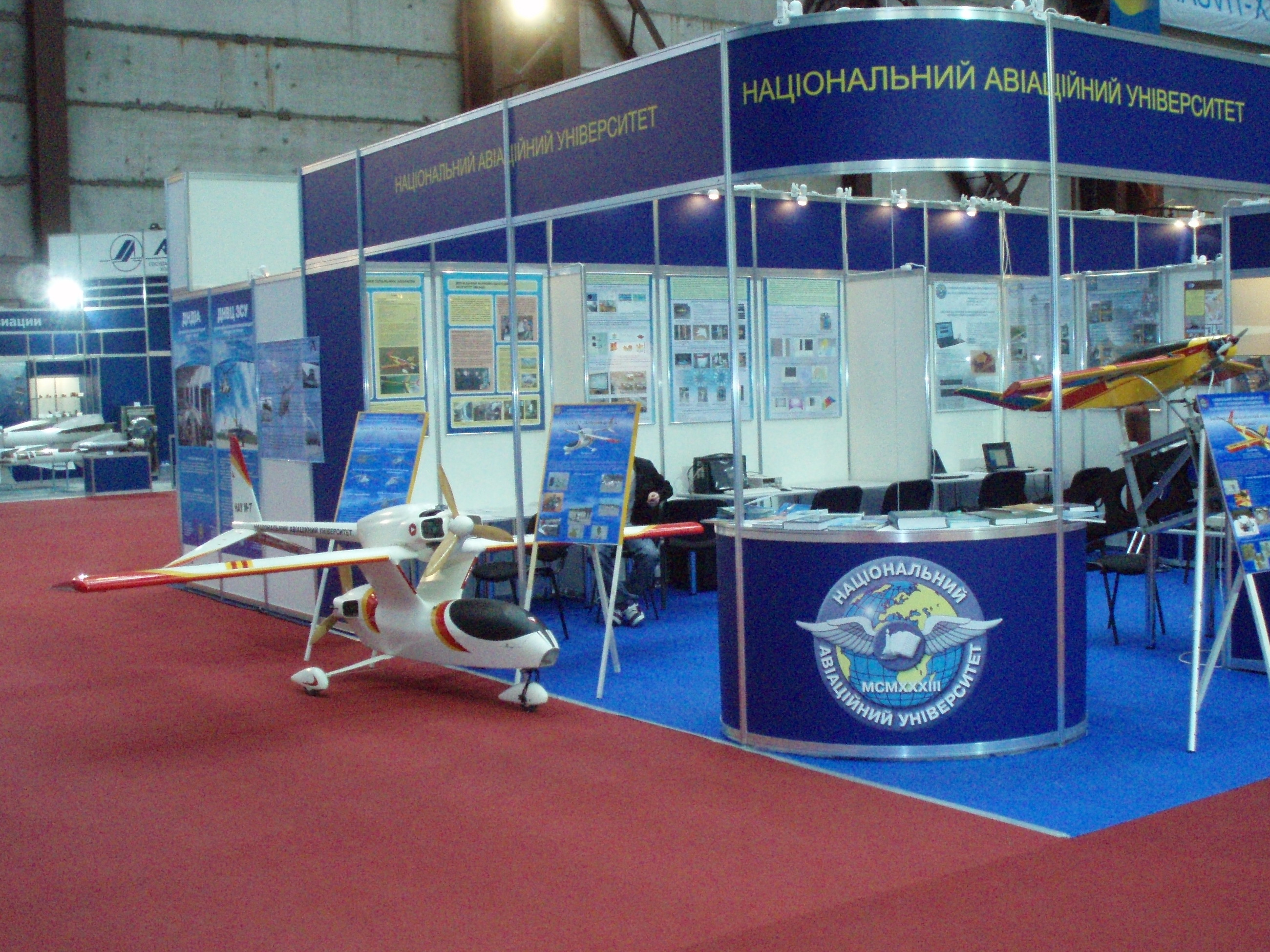 М-7 на міжнародному авіасалні Авіасвіт-XXI 2010 року в експозиції Національного Авіаційного Університету.